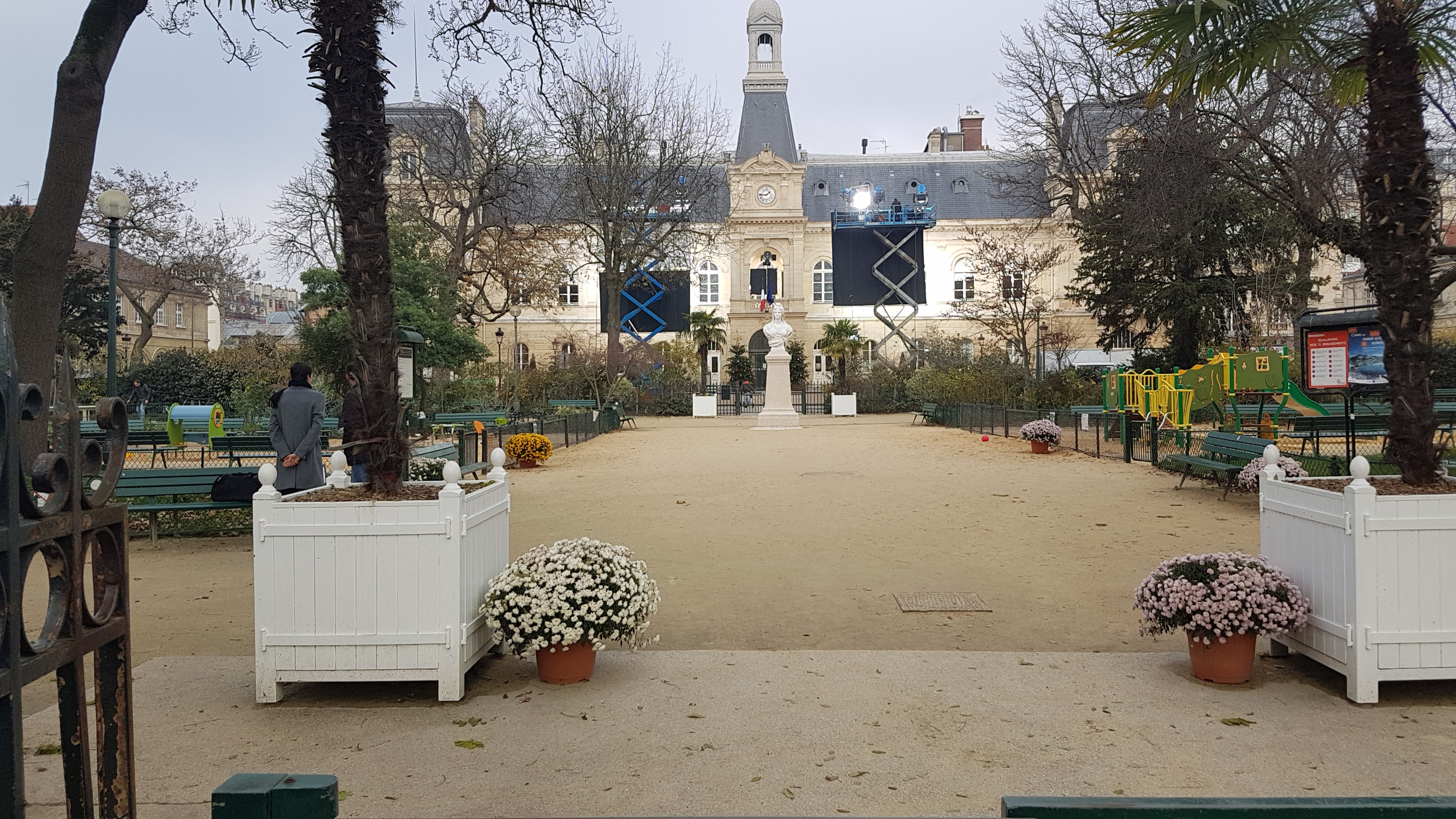 Eclairages extérieurs pour donner l'illusion qu'on est en été à Marseille